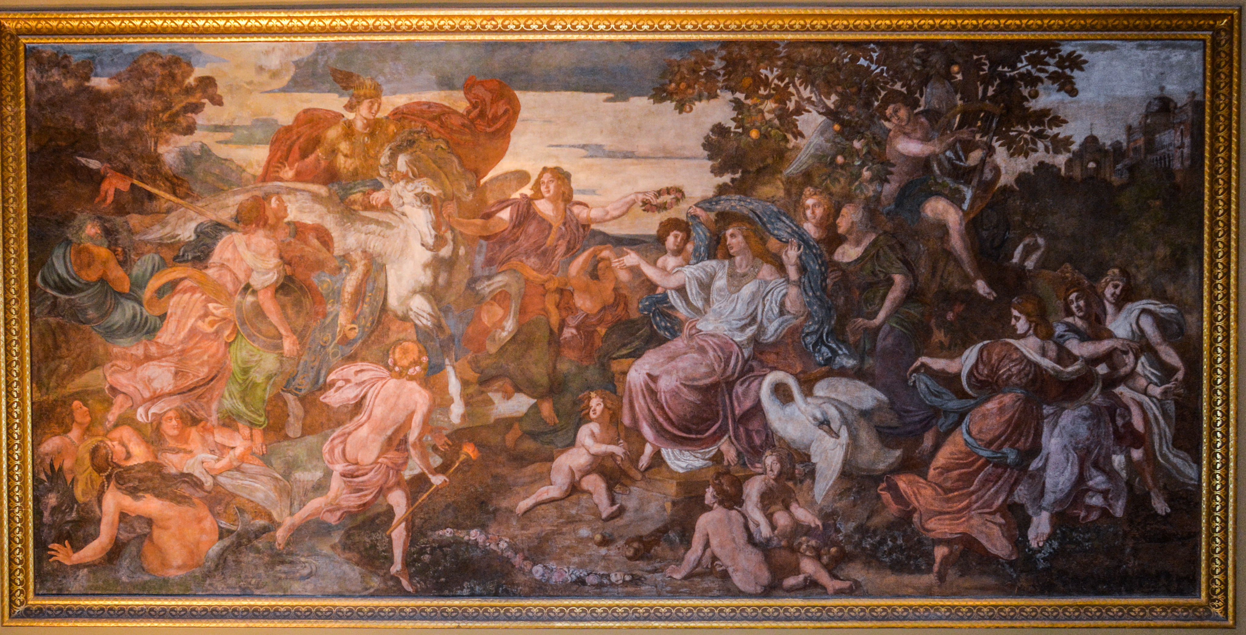 Tündér Ilona és Argylus királyfi találkozása, Lotz Károly freskója a Pesti Vigadóban (1865). A fénykép készítésének az időpontja: 2016.